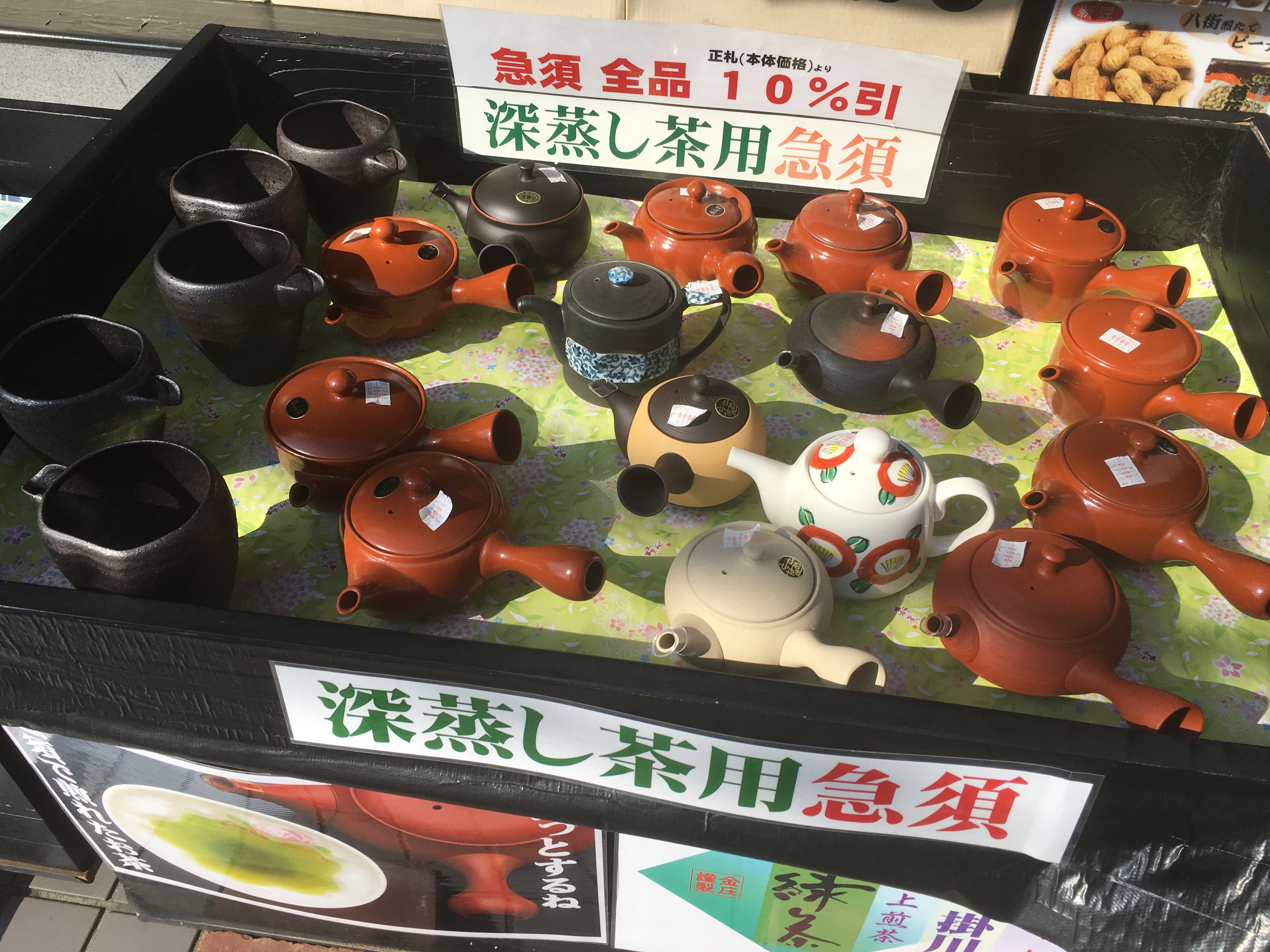 急須 (kyusu)